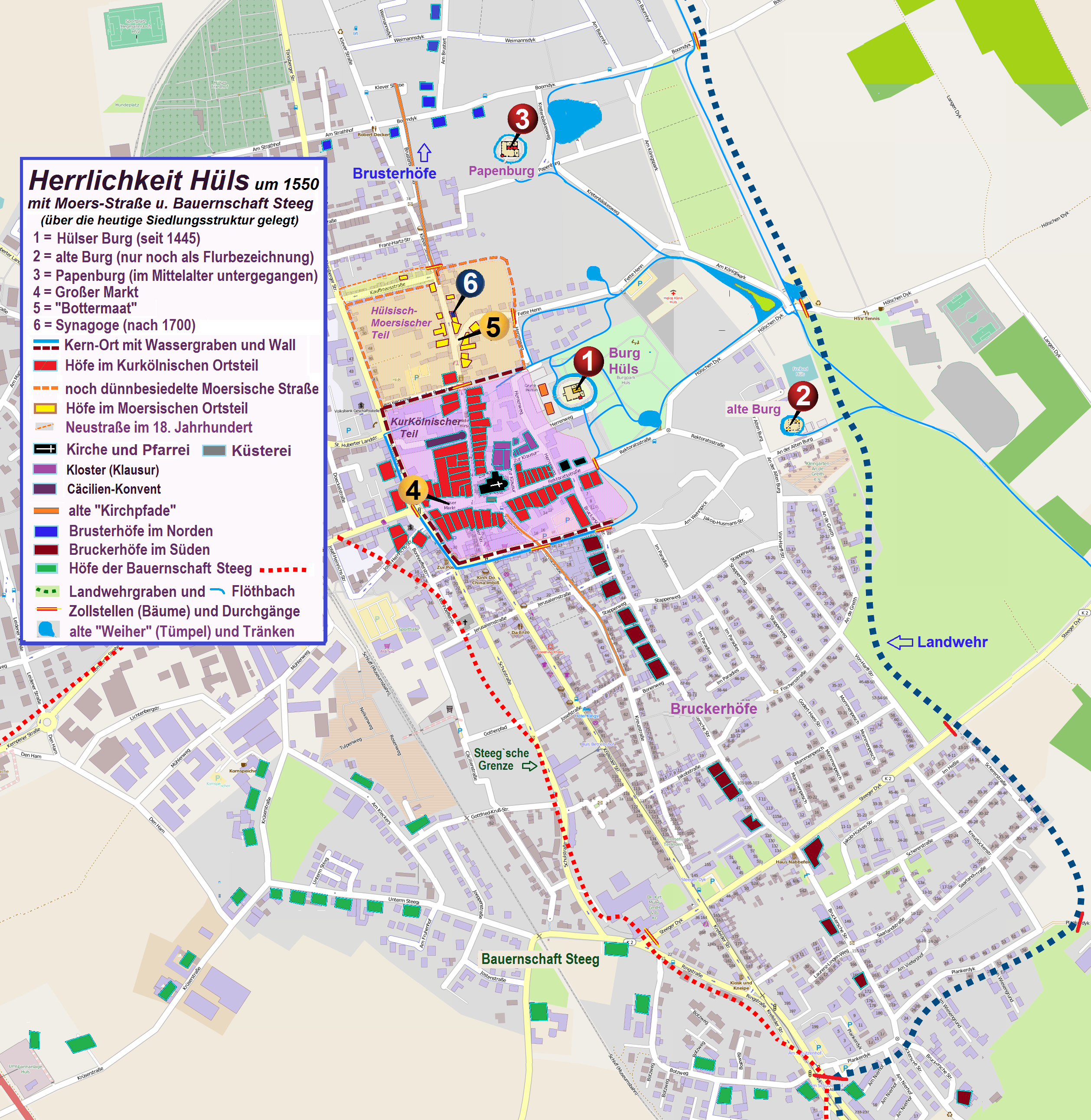 Besiedelung der Herrlichkeit Hüls im 16./17. Jahrhundert This map of Herrlichkeit Hüls (Krefeld) in 16./17. Jahrhundert was created from OpenStreetMap project data, collected by the community. This map may be incomplete, and may contain errors. Don't rely solely on it for navigation.